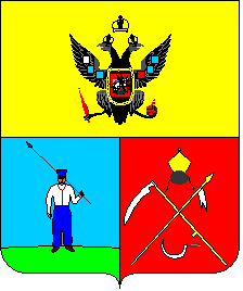 Герб Умані 1845 року